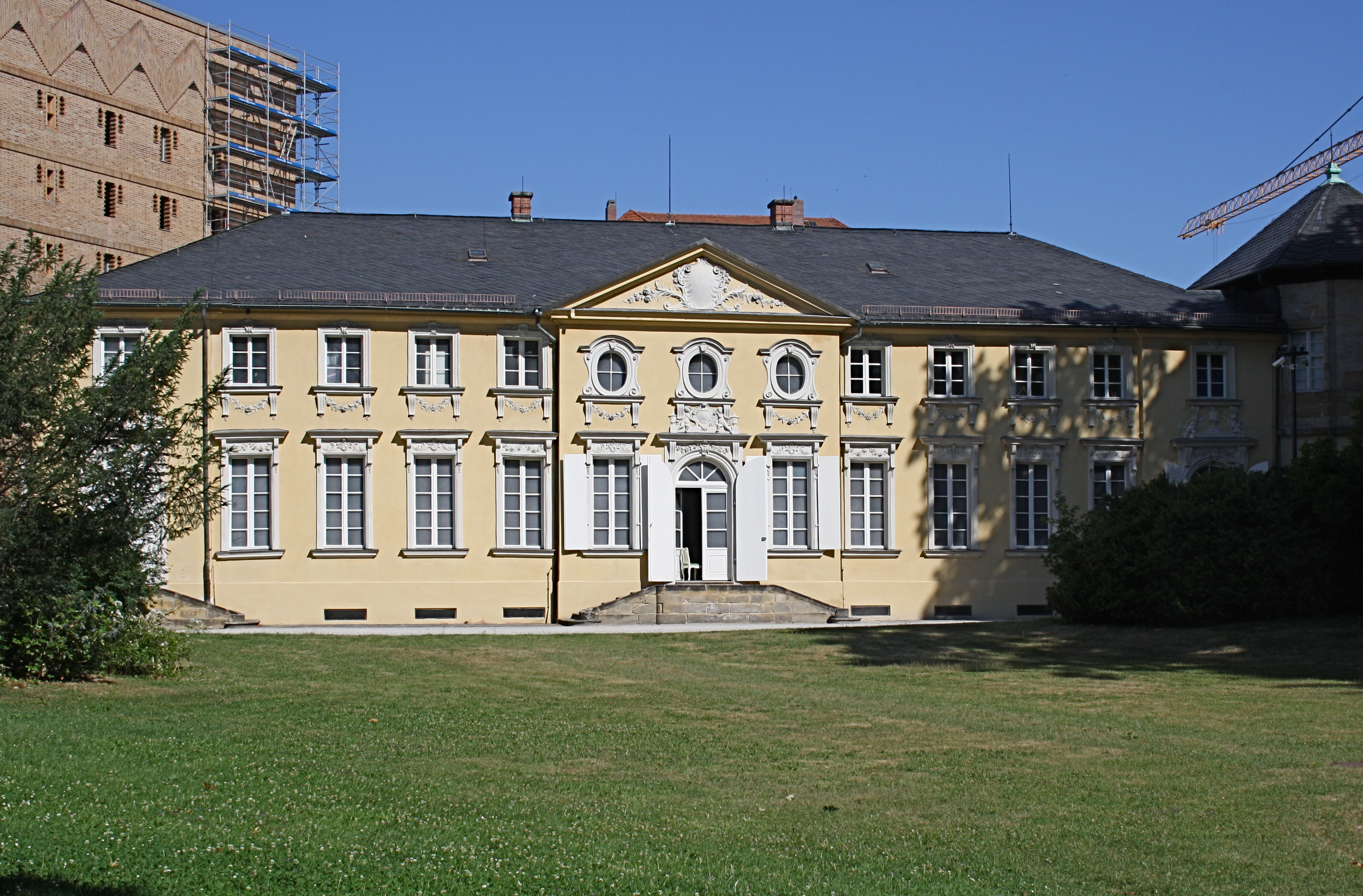 Italienischer Bau des Neuen Schlosses in Bayreuth